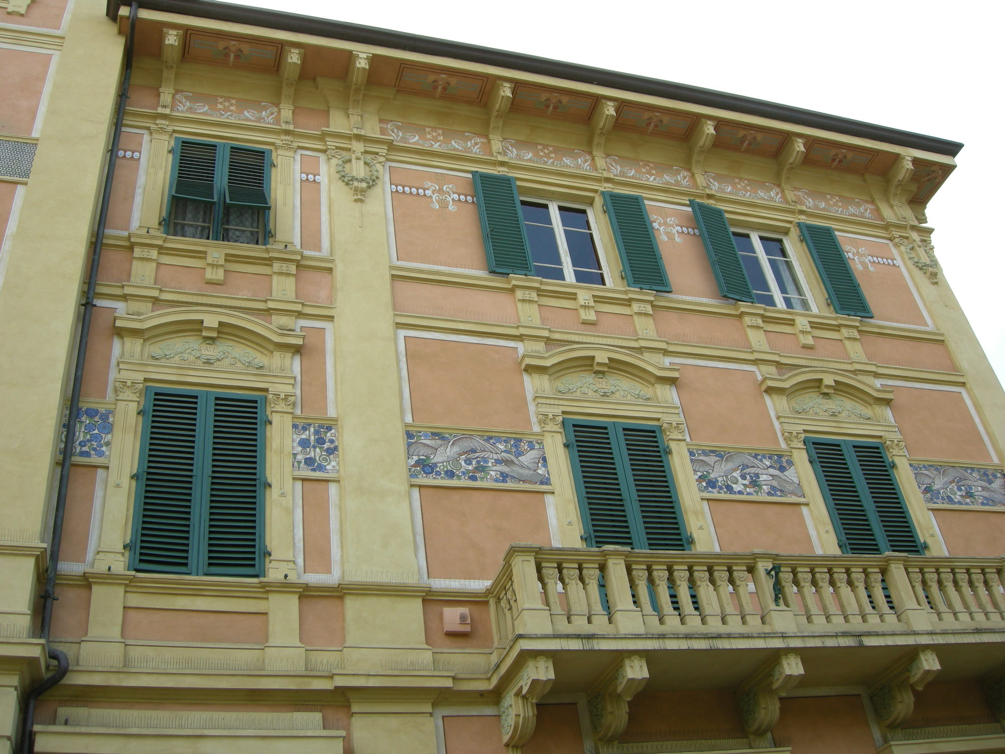 Villa Del Magro